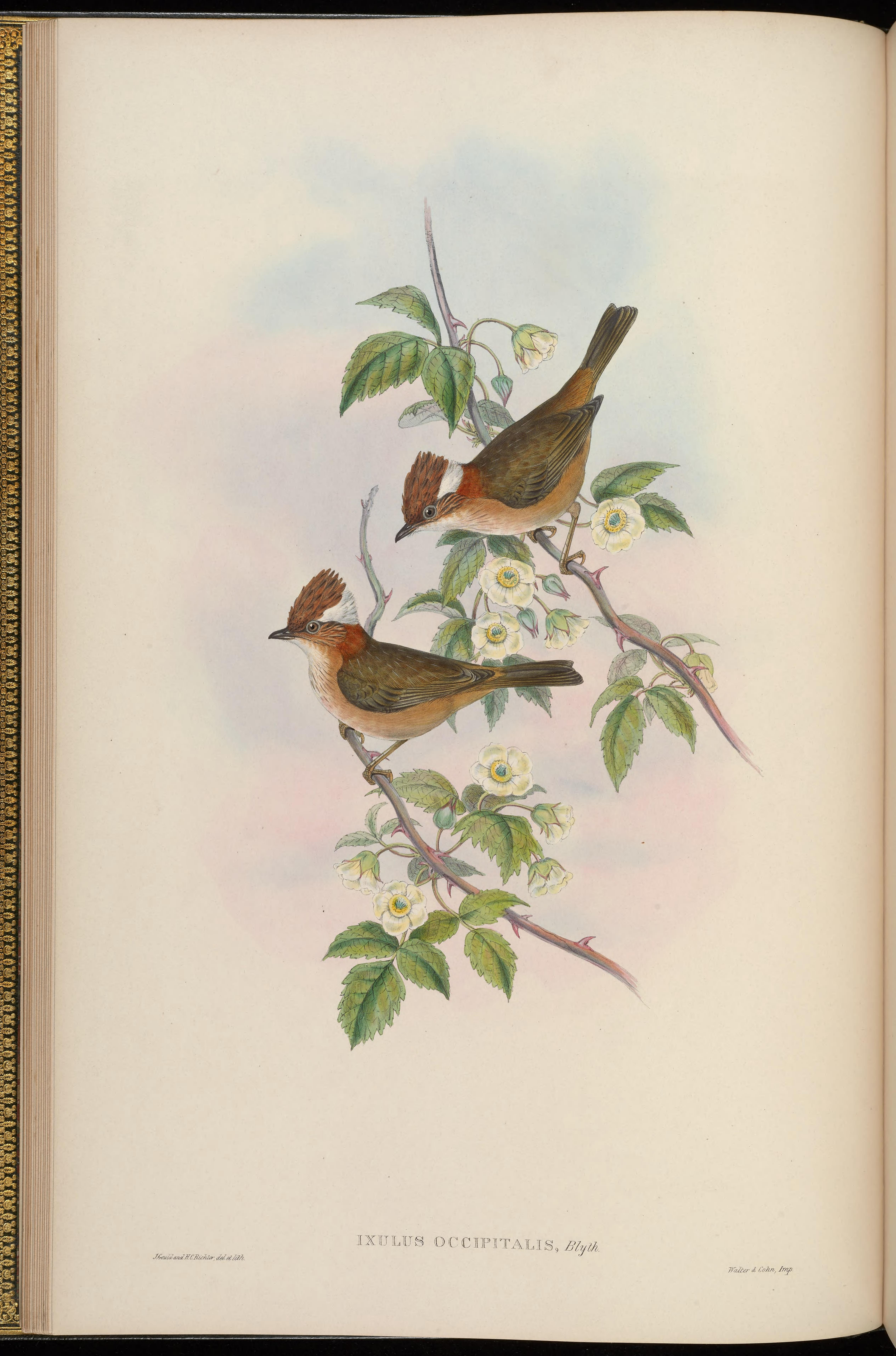 Ixulus occipitalis = Yuhina bakeri[1]